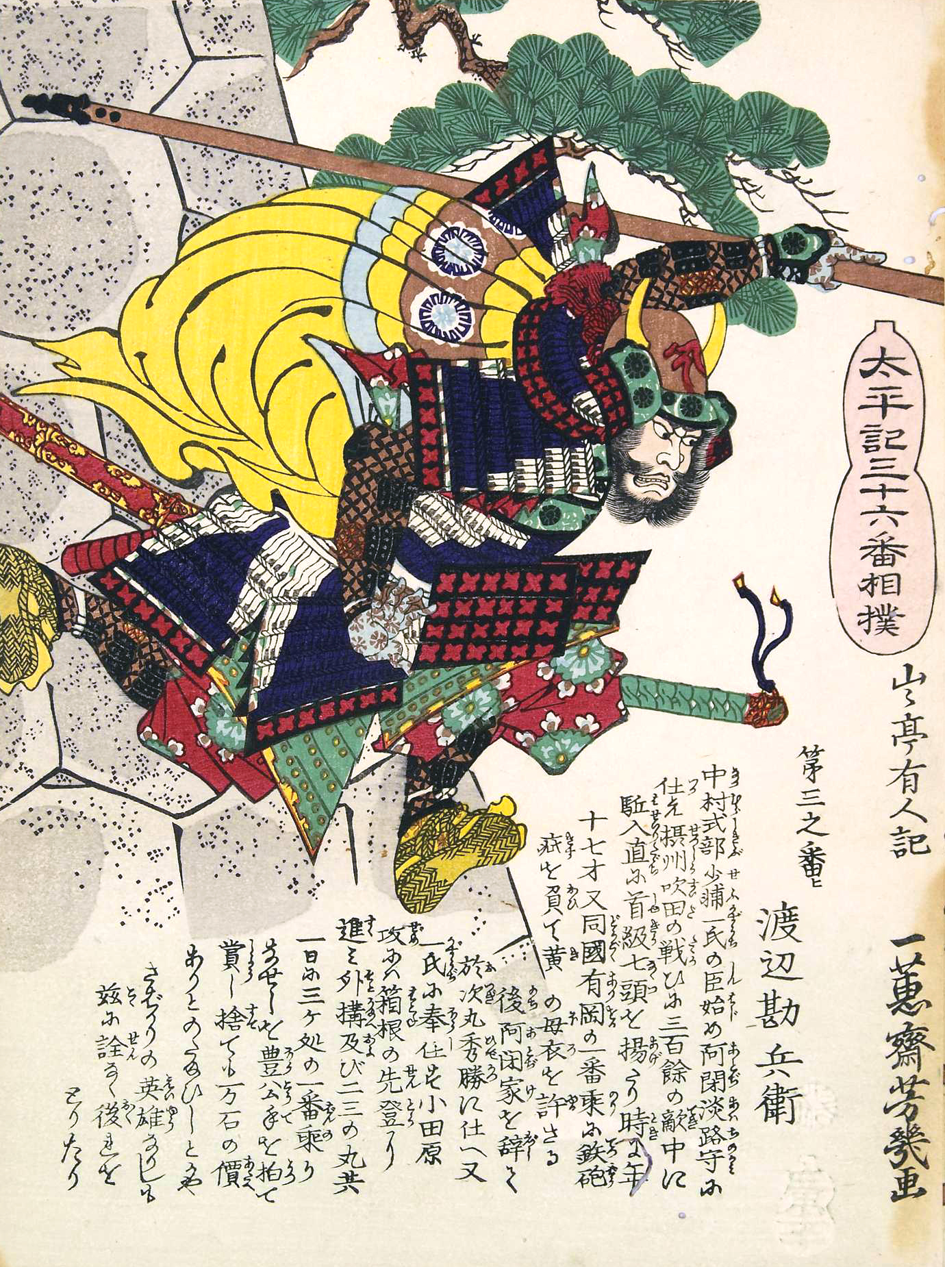 太平記三十六番相撲：第三之番ヒ「渡辺勘兵衛」